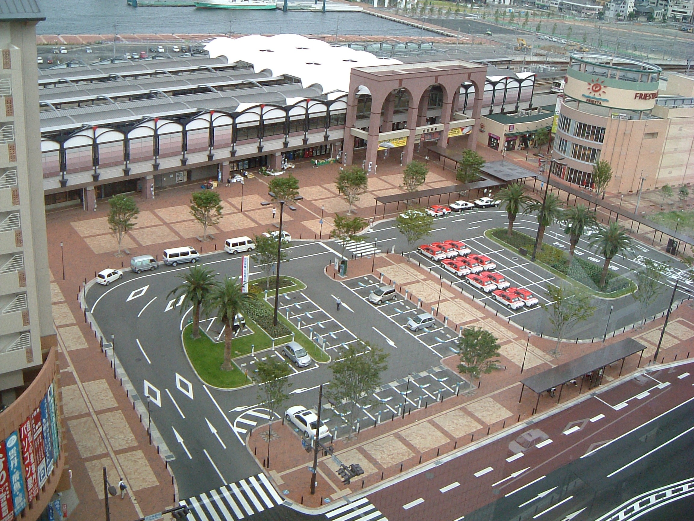 投稿者が2007年7月25日に撮影